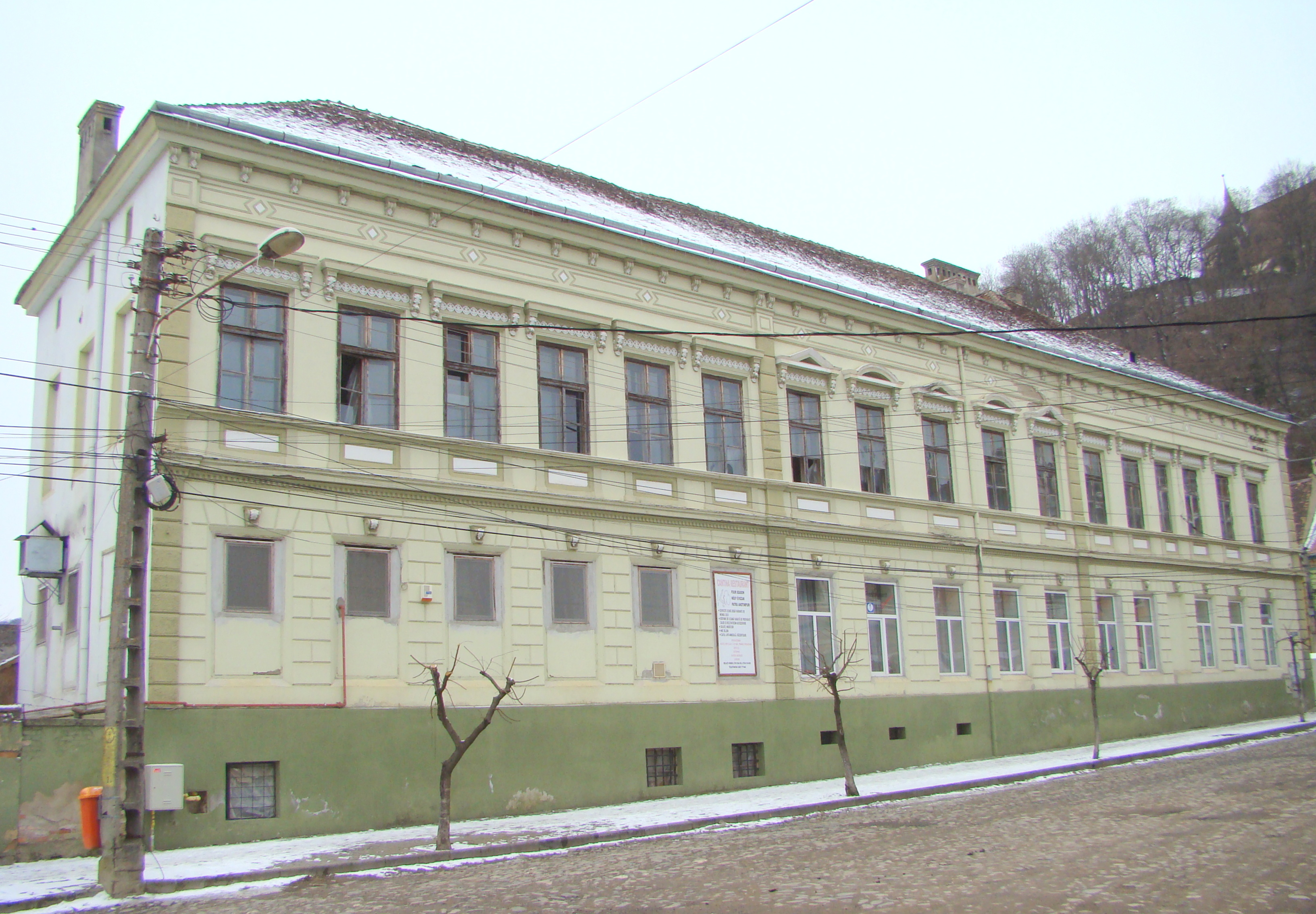 Fostul azil, azi casa Nikos Beloianis, municipiul Sighișoara, str. Bălcescu Nicolae 4 mijl. sec. XVIII, înc. sec. XIX